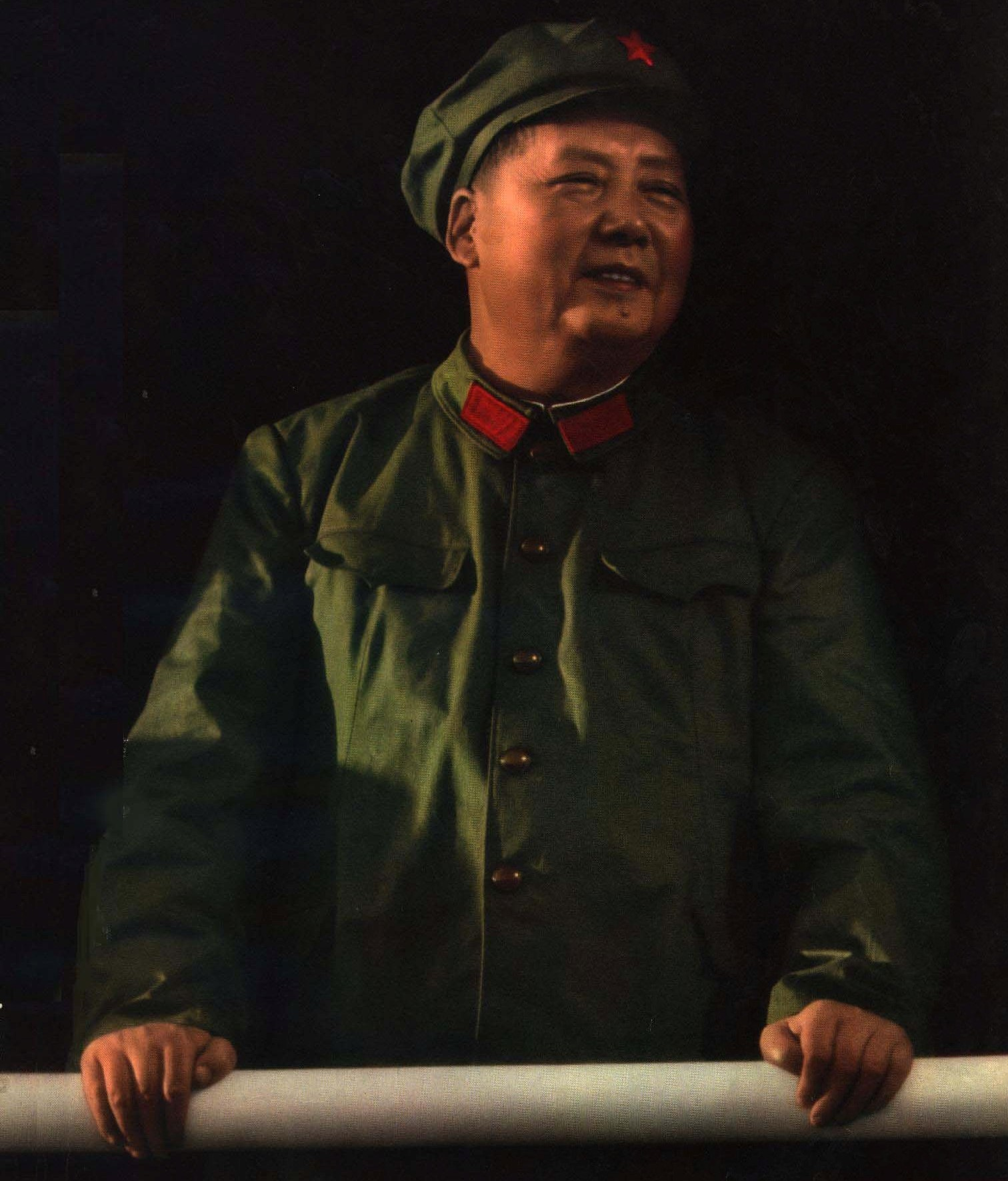 1967-03 1967年毛泽东